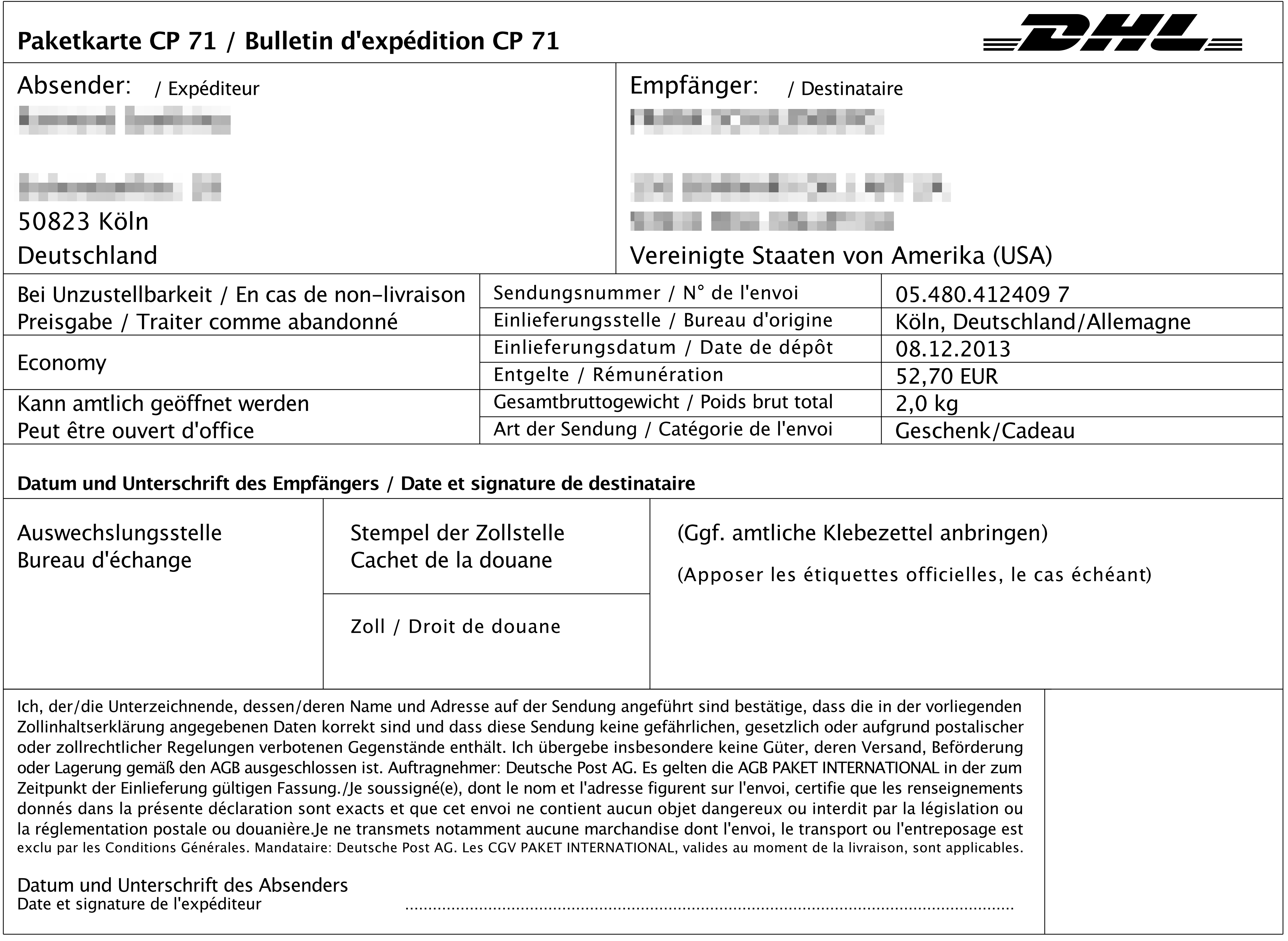 Paketkarte CP 71, die im Rahmen einer DHL Online-Frankierung für ein Paket bis 5 kg von Deutschland in die USA mitgedruckt wurde